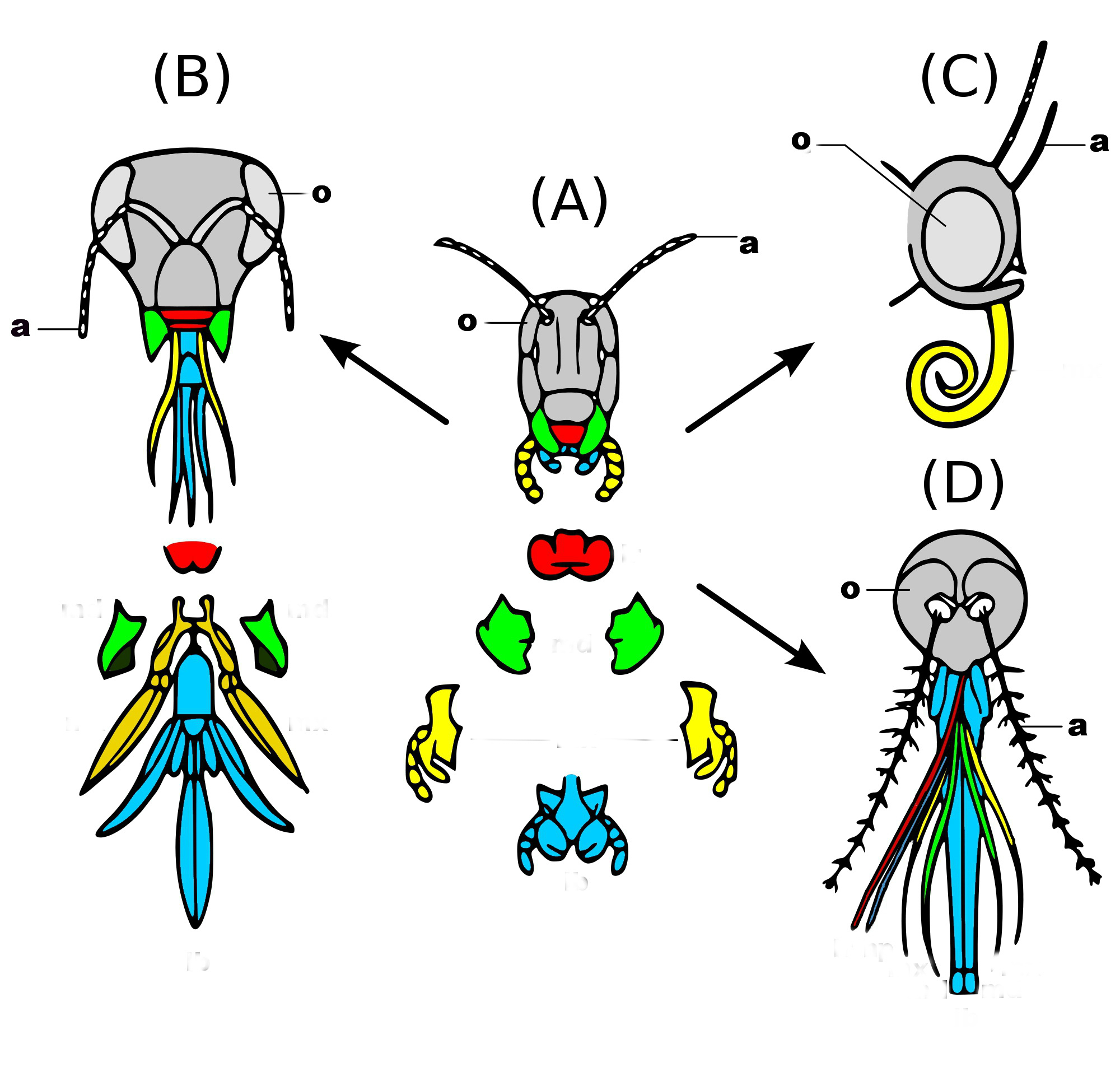 Малюнок: кольорова схема еволюції ротового апарату комах